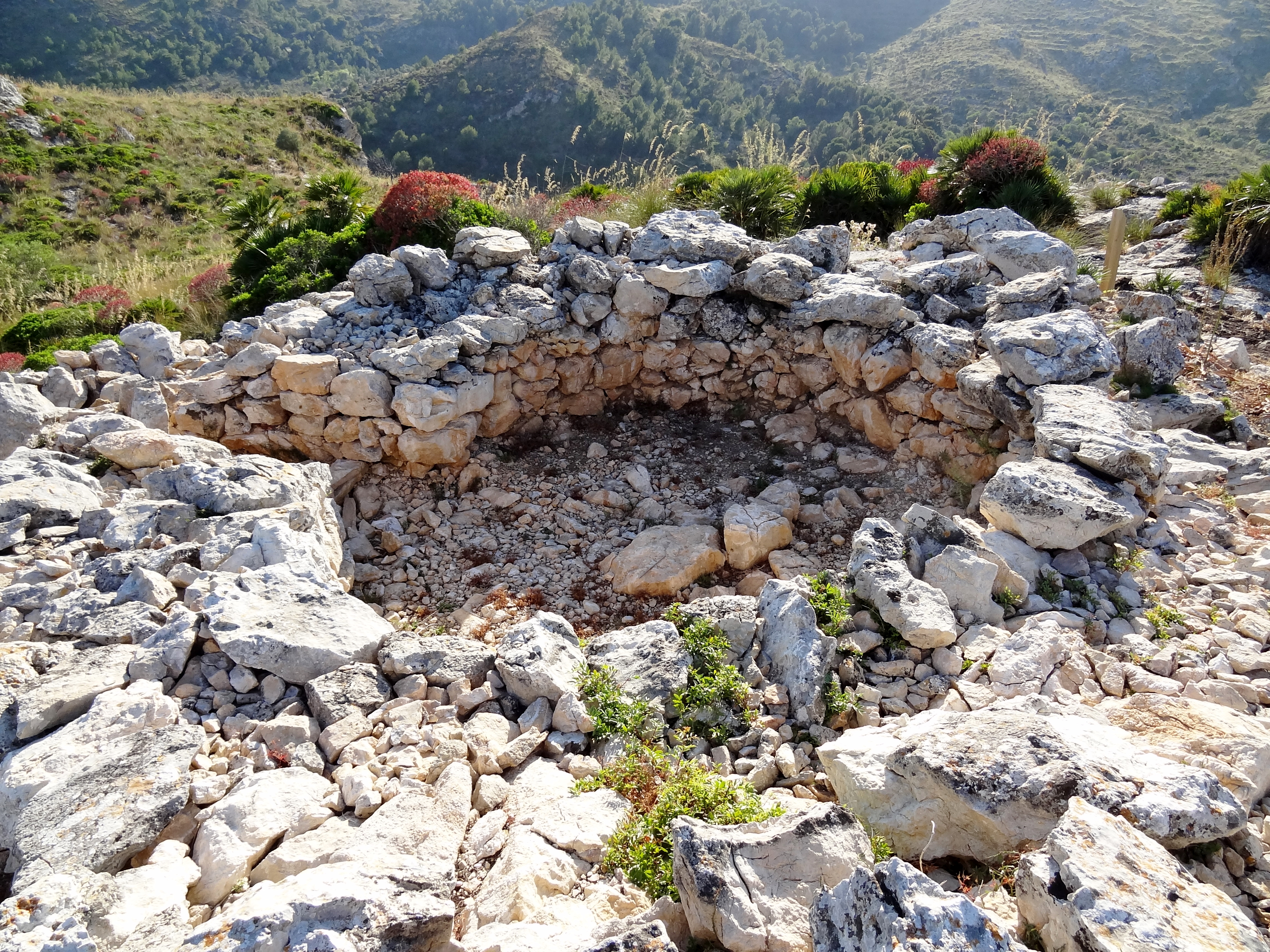 Talaiot auf dem Puig Figuer, Gemeinde Artà, Mallorca, Spanien